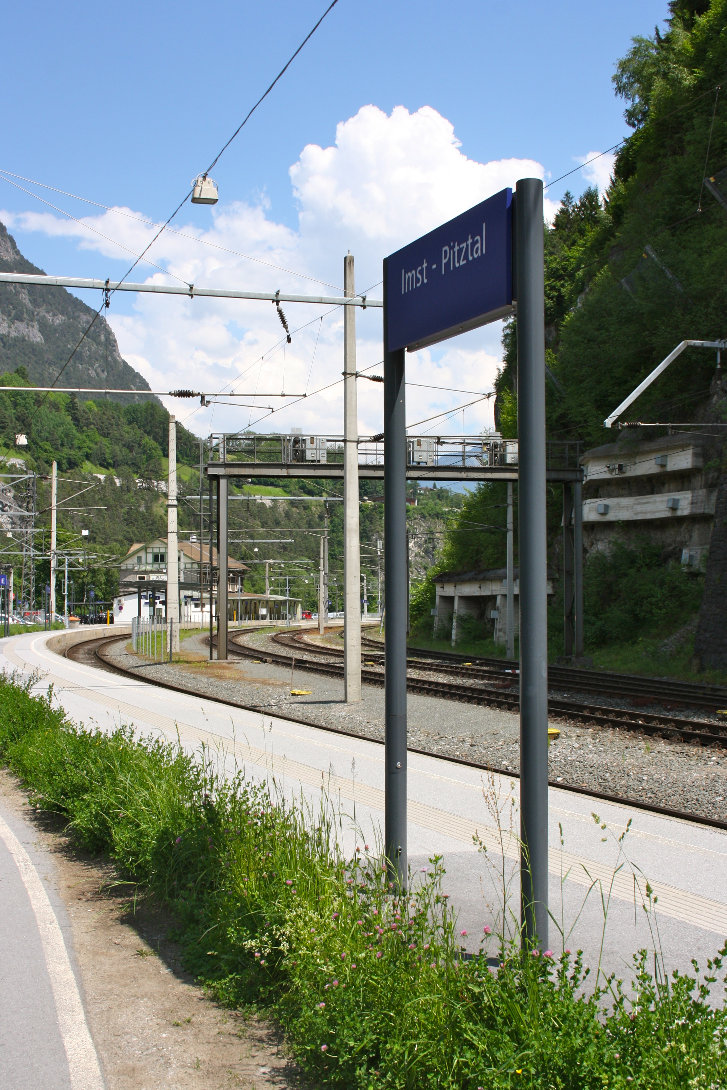 Schild am Bahnsteig des Bahnhofs Imst-Pitztal.